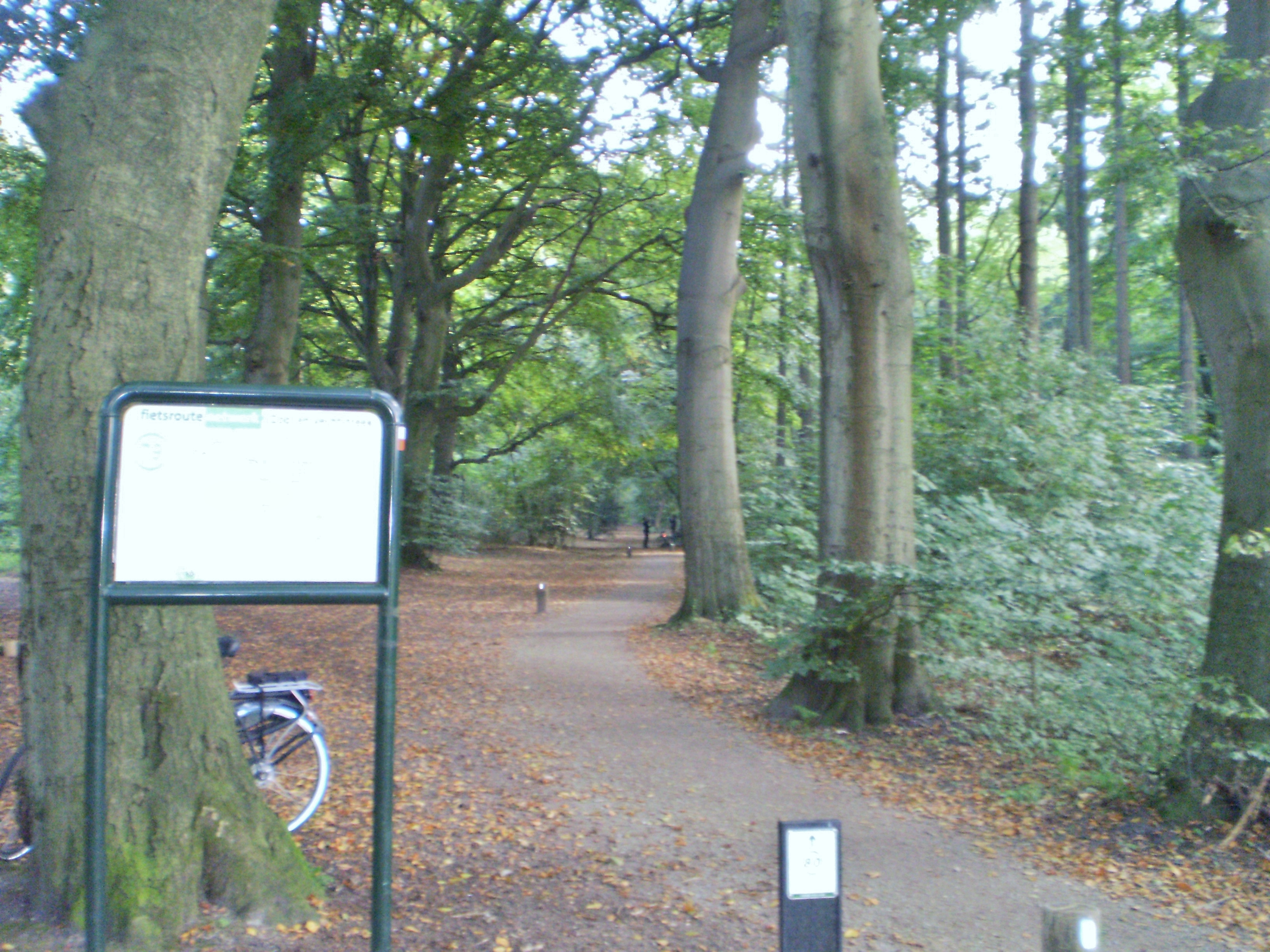 Bikbergse bos vanaf de Nieuwe Bussumerweg